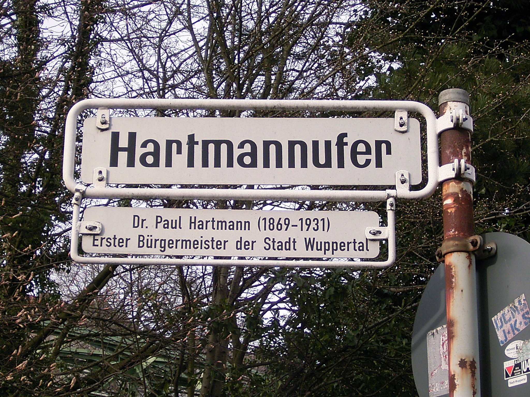 Hartmannufer in Wuppertal